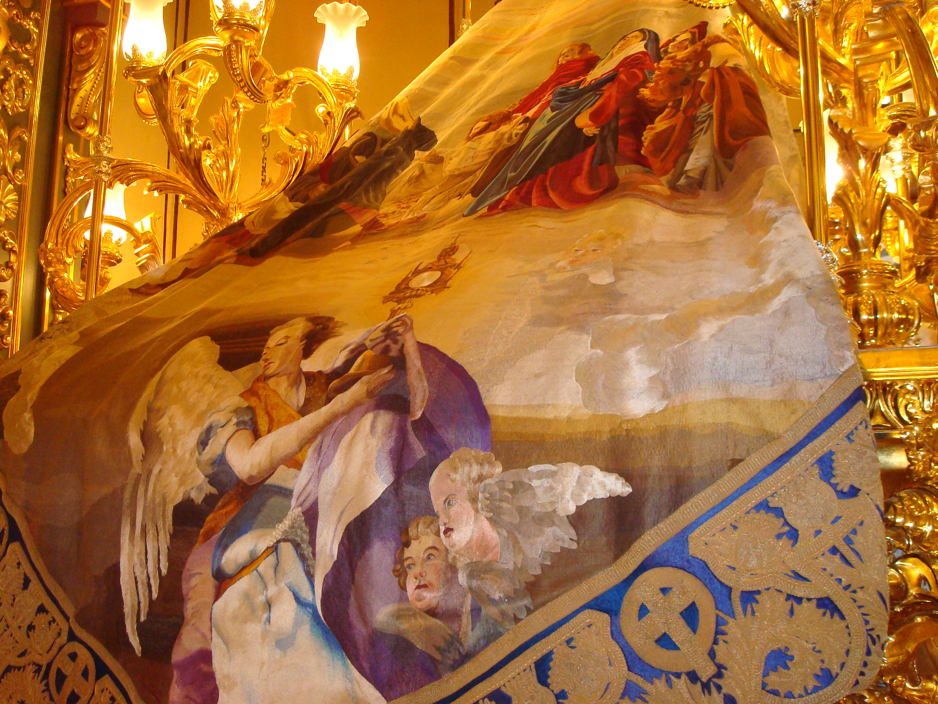 Manto de la Virgen de la Amargura, Semana Santa, Lorca